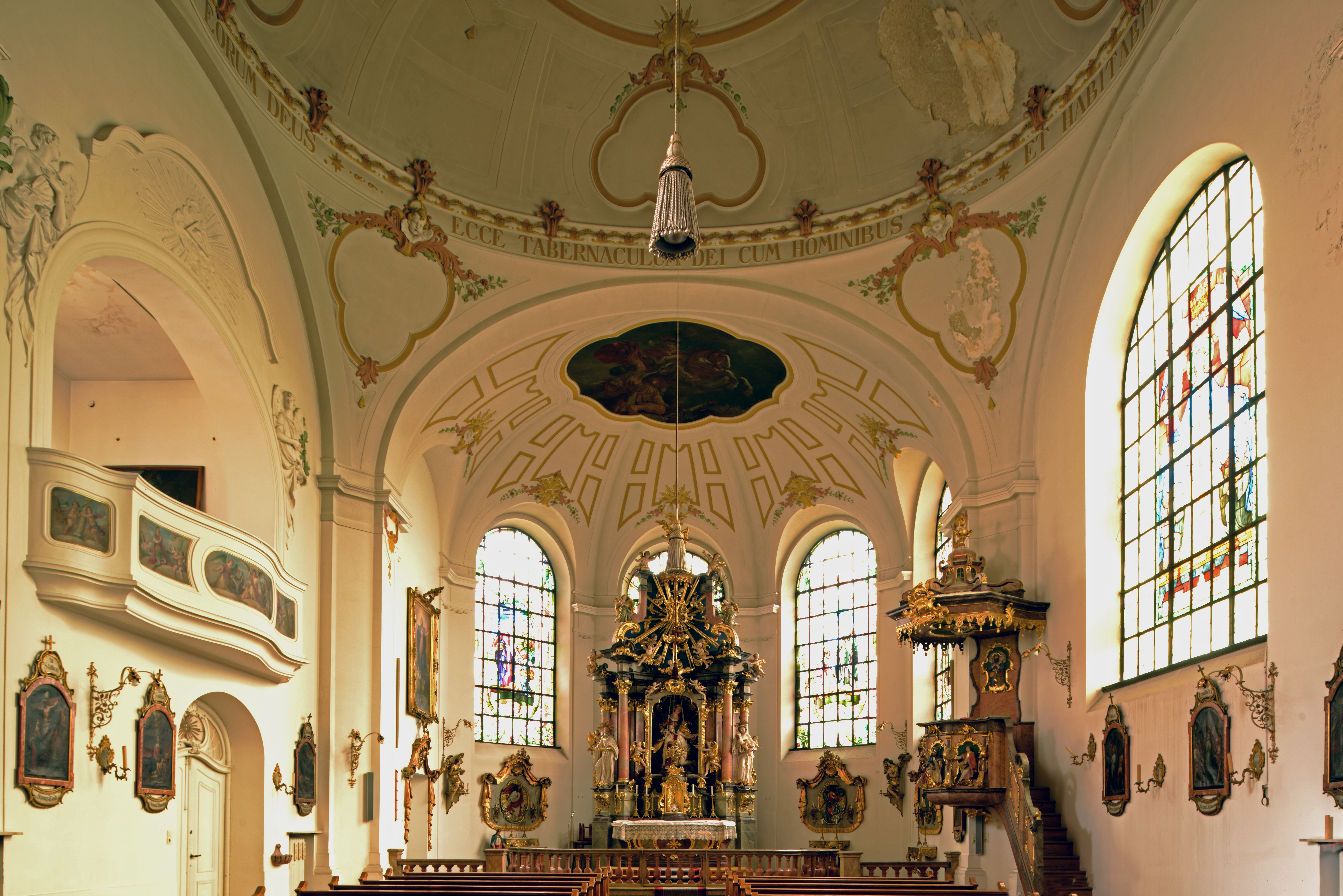 München, Giesing. Sankt Martin Spital Kirche. Innenraum.